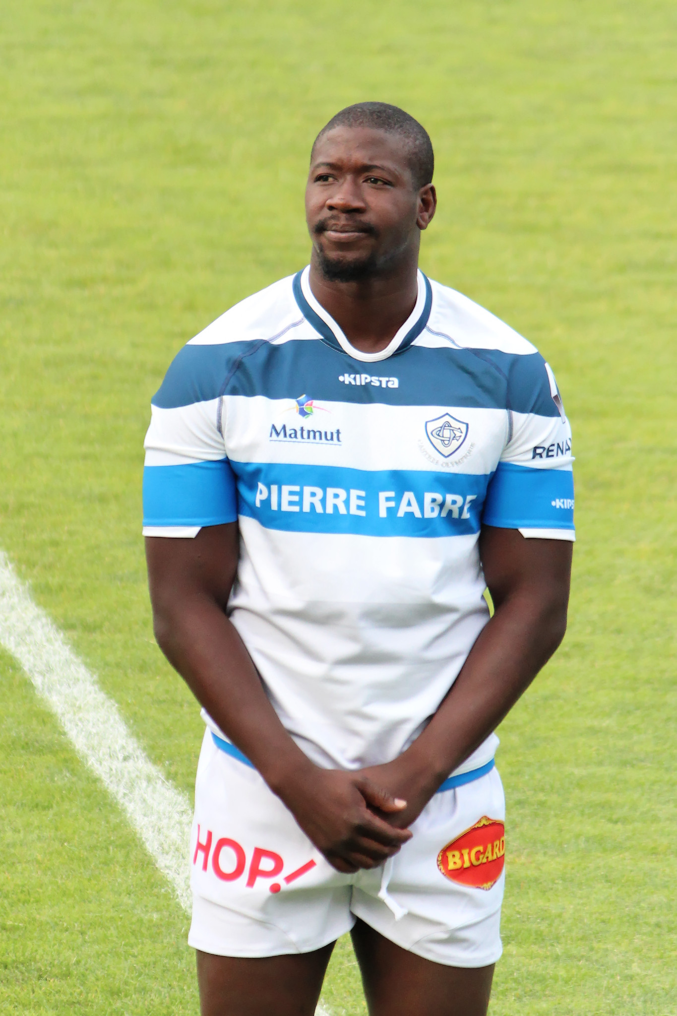 Joueurs du Castres Olympique lors de la présentation de l'équipe pour la saison 2015-2016